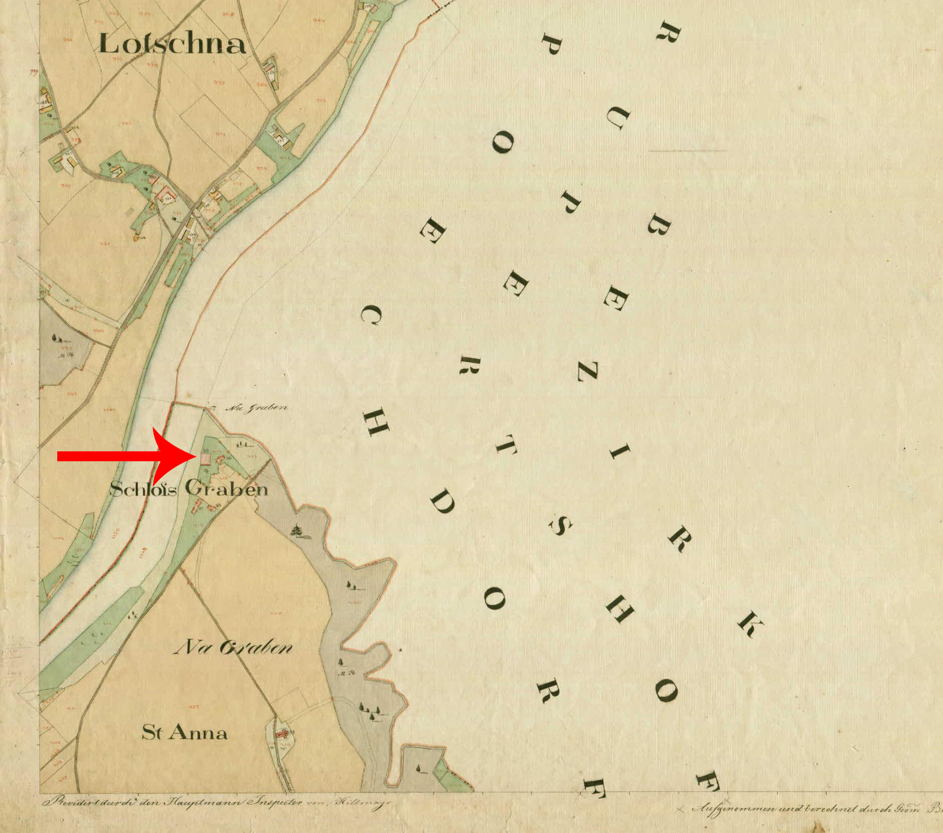 Franciscejski kataster za Kranjsko, 1823-1869